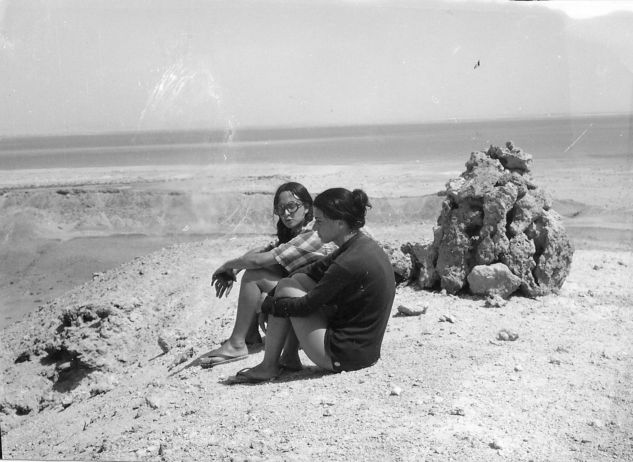 סקר מפרץ שלמה 1970- עפרה גורי (משמאל) ונעמה גורן באי סנפיר